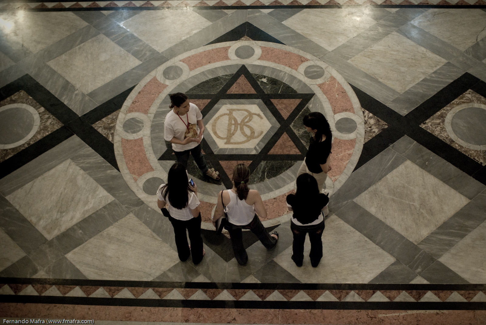 Bolsa do Café, in Santos, Brazil.